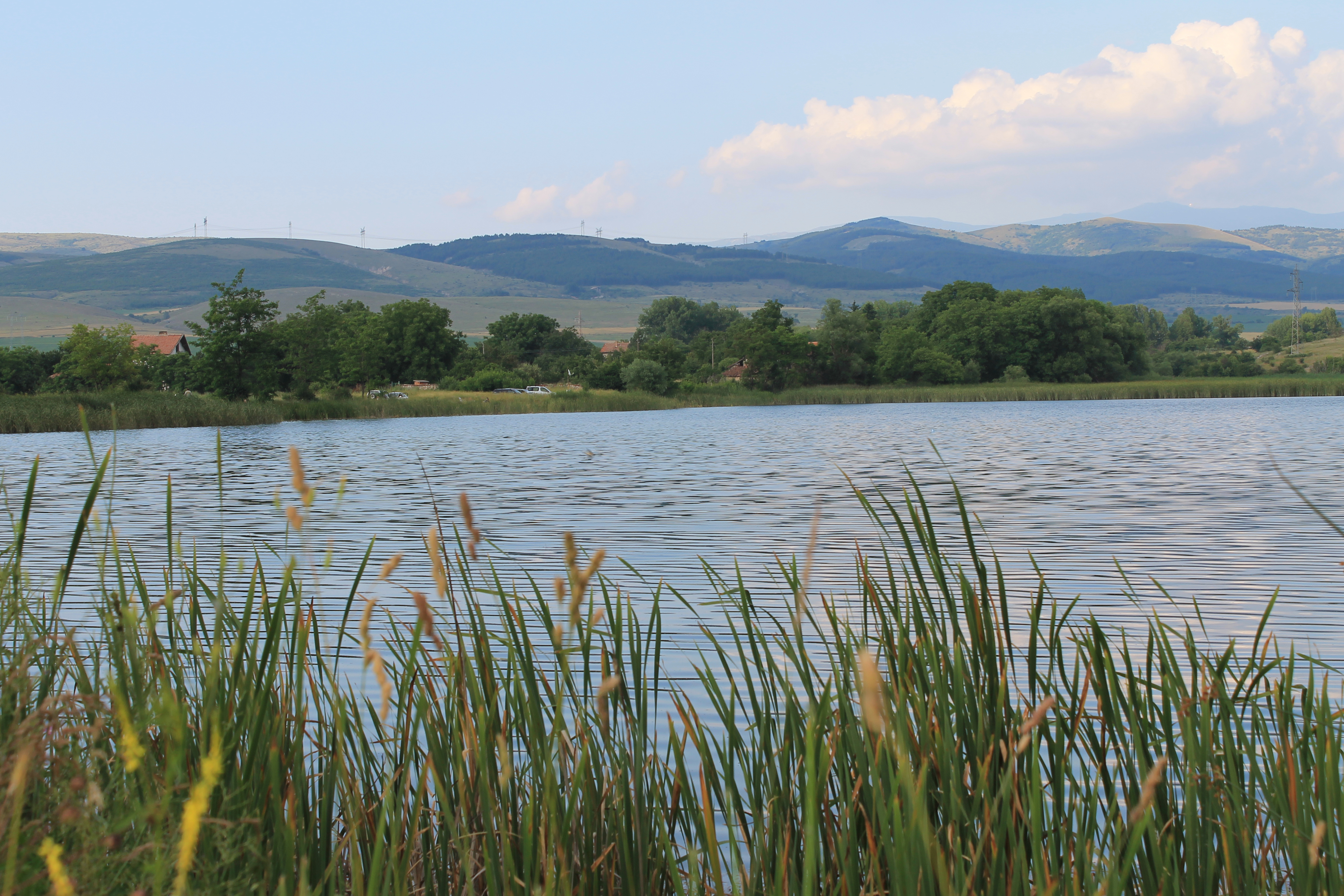 Язовирът в с. Стефаново